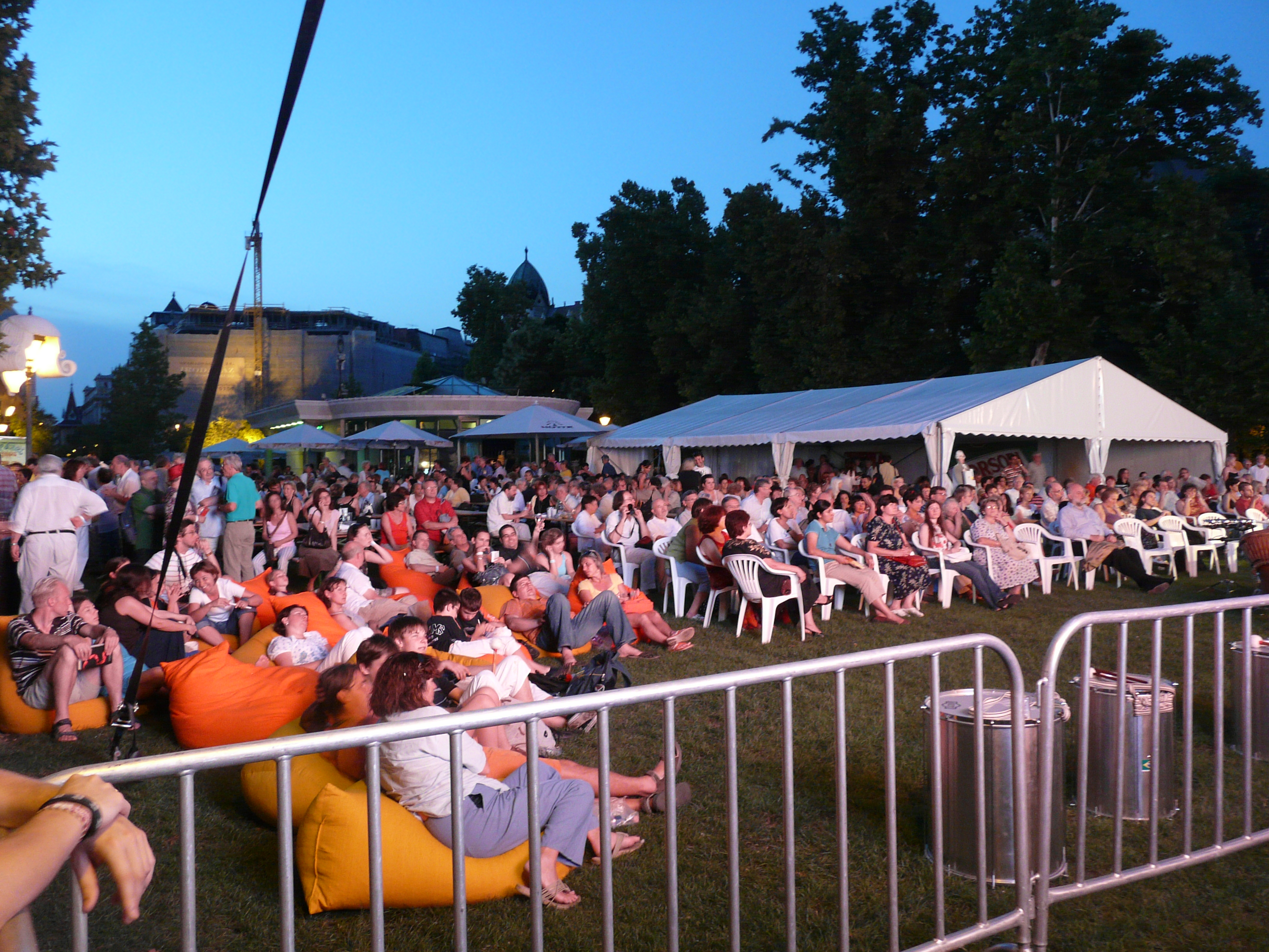 Budapest, Szabadság tér. A Magyar Televízió dolgozói és korábbi munkatársai búcsúztak a televízió épületétől, mely egy hosszú, öt évtizedes korszakban otthonuk volt